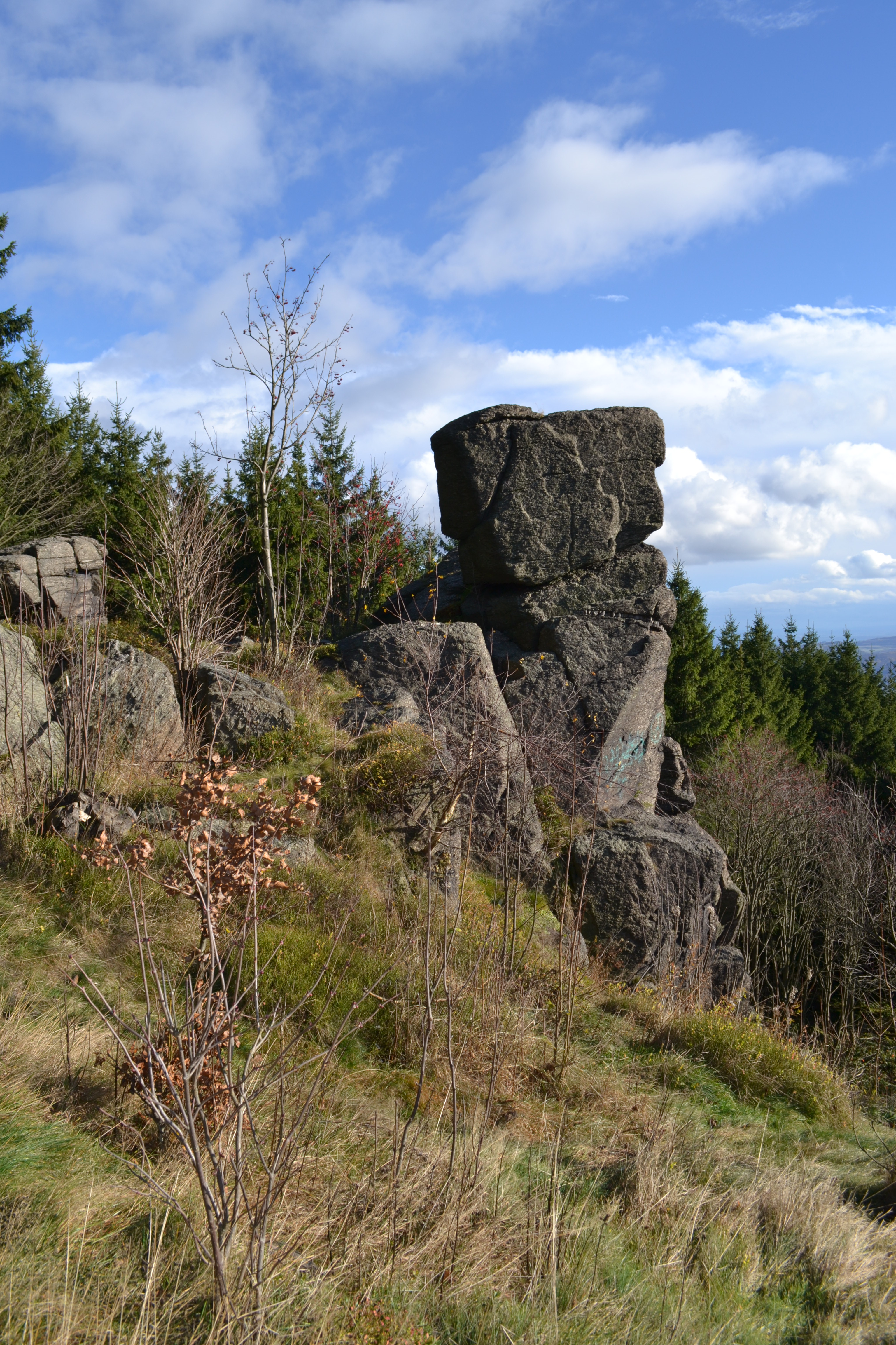 Přírodní památka Sfingy